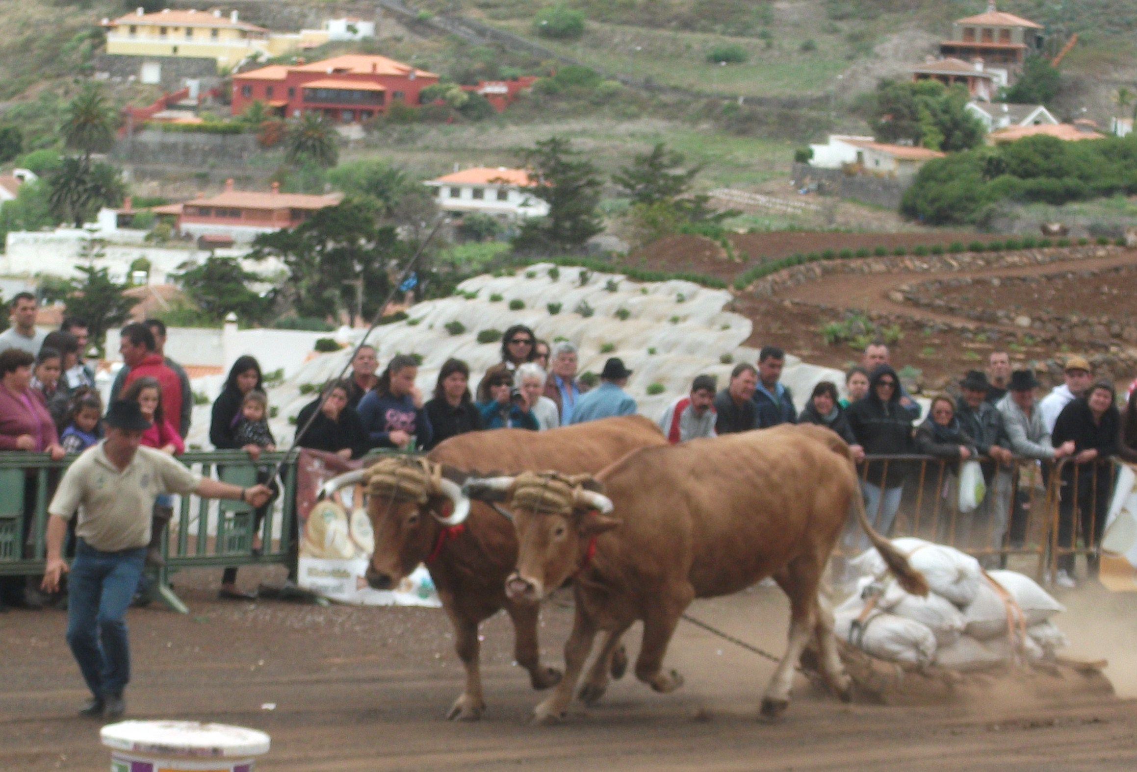 Yunta realizando una prueba de arrastre en Tegueste, guiada por un boyero.